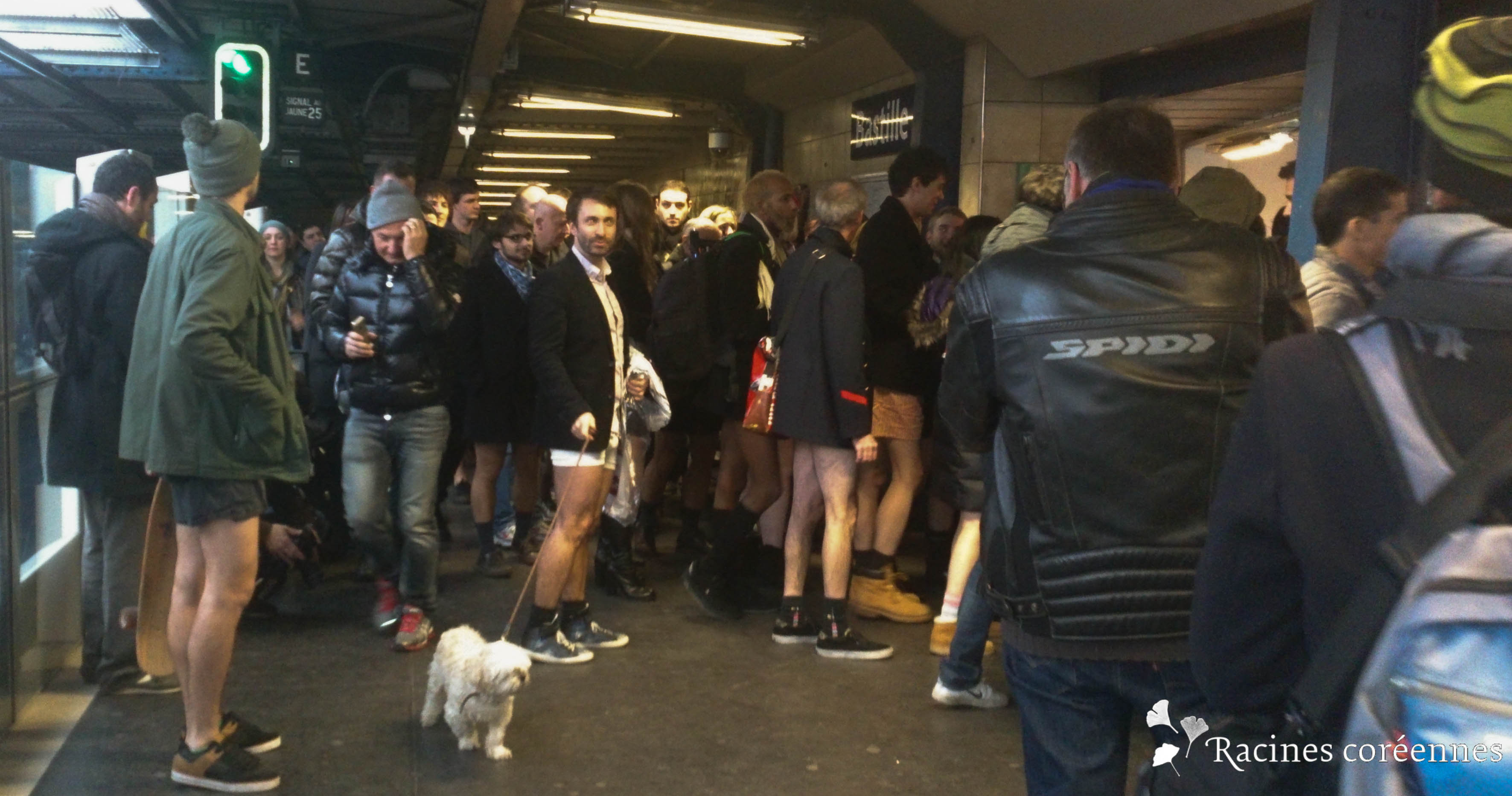 No Pants Subway Ride 2014 - Paris Le dimanche 12 janvier 2014, les Parisiens ont répondu à l'invitation d'Improv Everywhere pour participer à la 13e édition de la No Pants Subway Ride.. A Paris, ce n'était que la 3e édition, mais 150 personnes sont venues au rendez-vous sur la place Charles de Gaulle. Après un briefing, les participants sont descendus dans le métro et tous ont 'ridé' sans pantalon de la Station Étoile à la Station Bastille. Le finale, c'est déroulé sur les marches de l'Opéra Bastille. Event FB